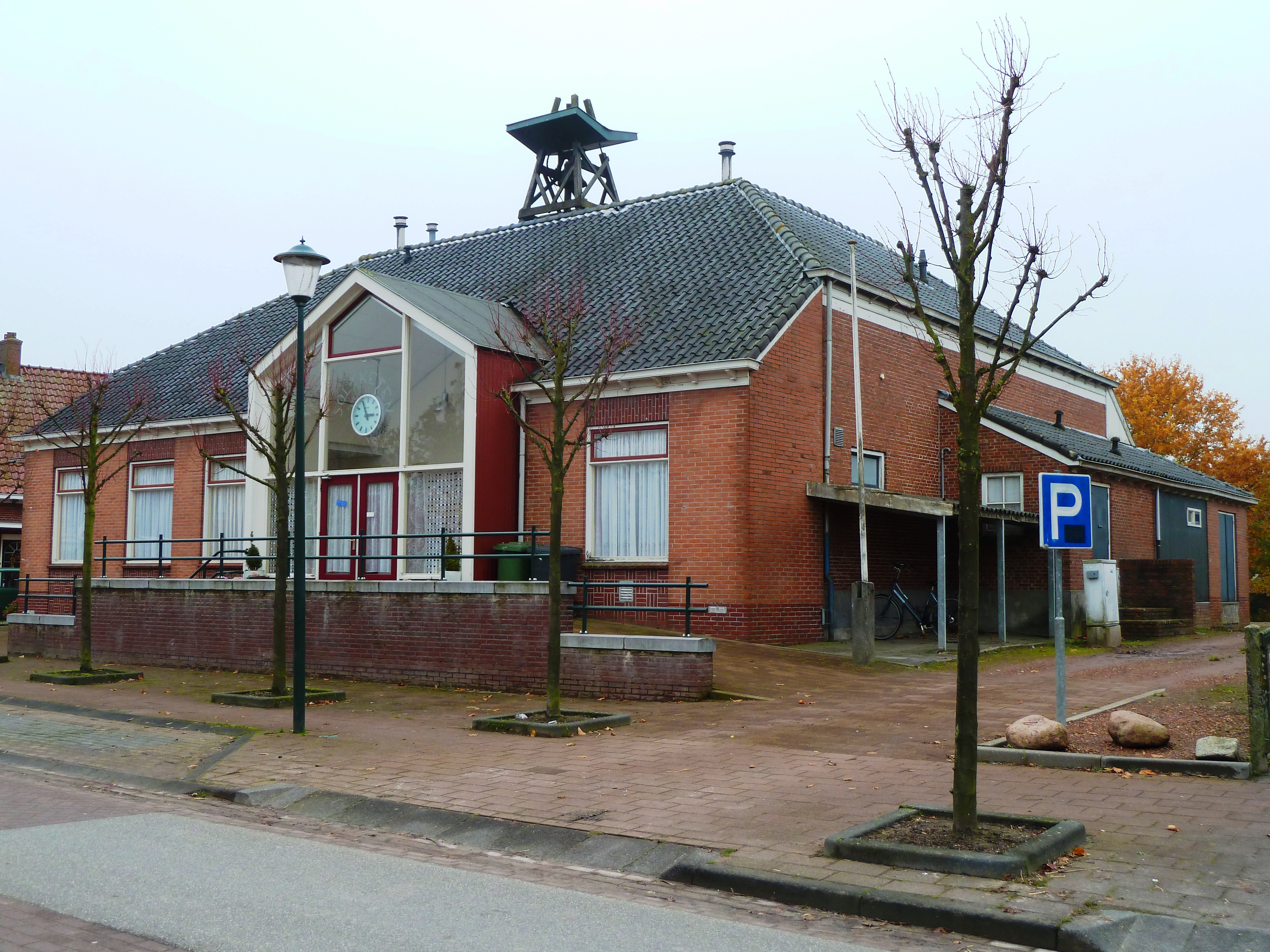 Dorpshuis 'Soltketen' in Kommerzijl. De naam verwijst naar de 'zoutketels' die werden gebruikt in de zoutwinning door Wigbolt van Ewsum rond 1572.